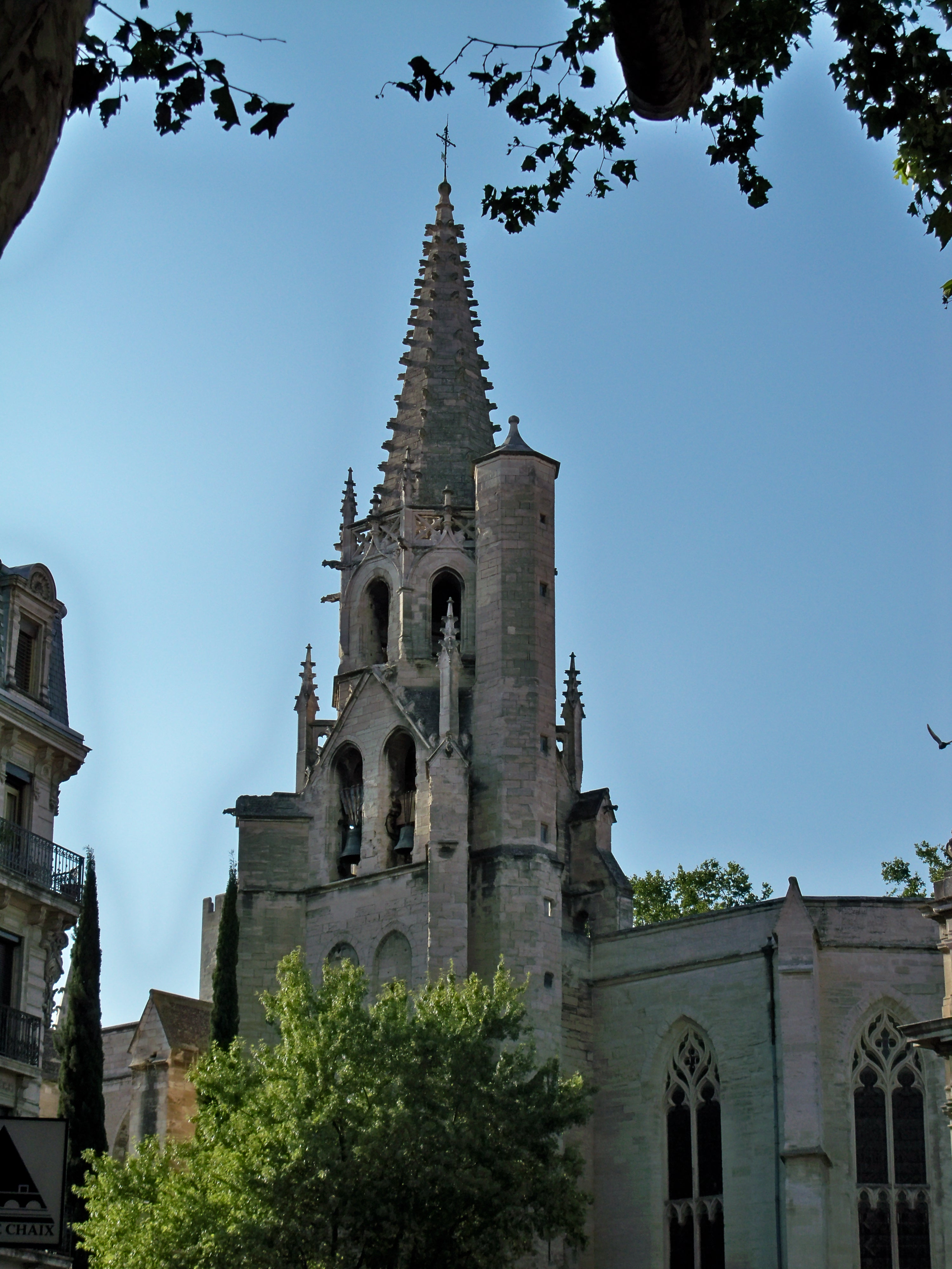 Clocher de l'église Saint Pierre à Avignon, Vaucluse